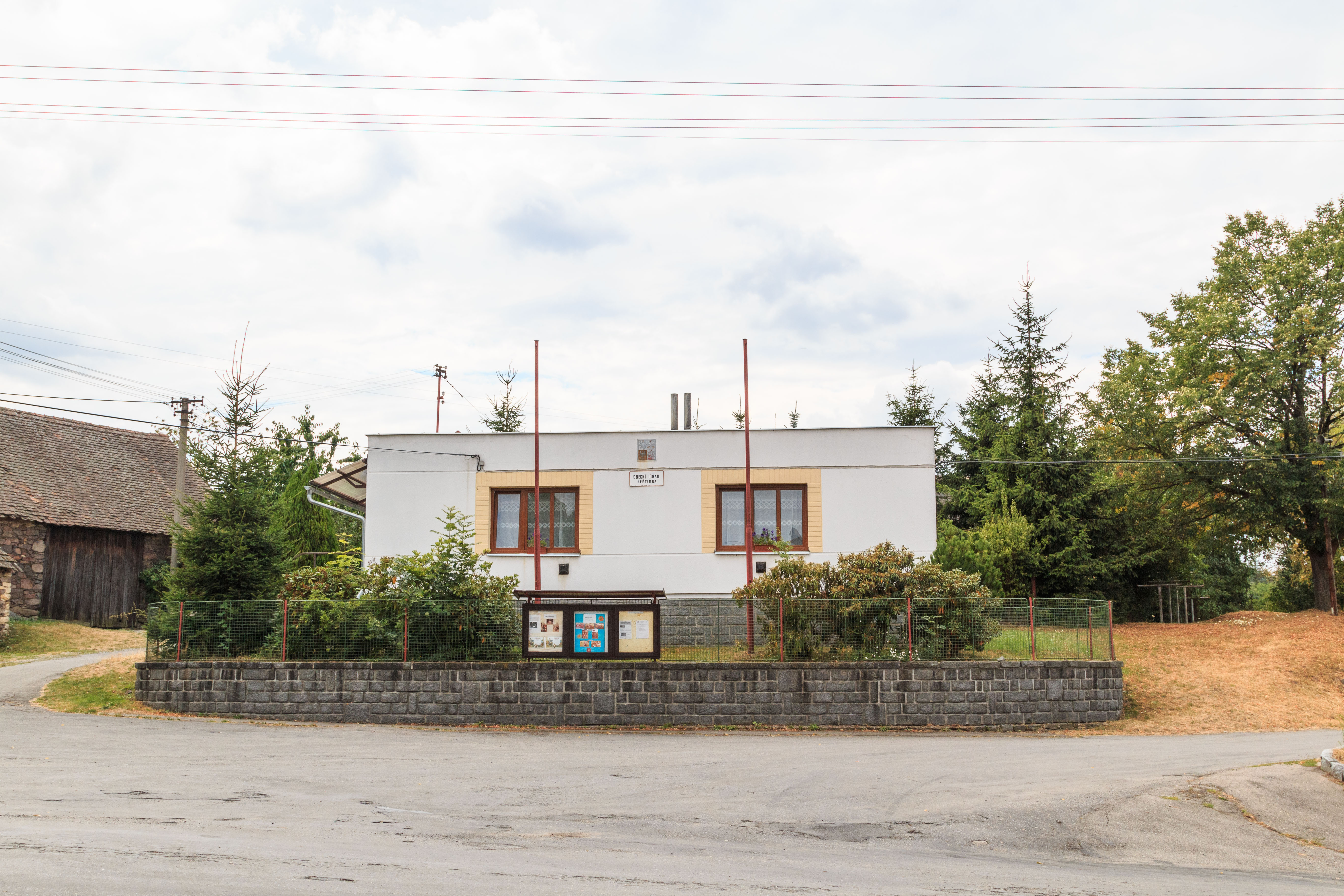 Leštinka obecní úřad